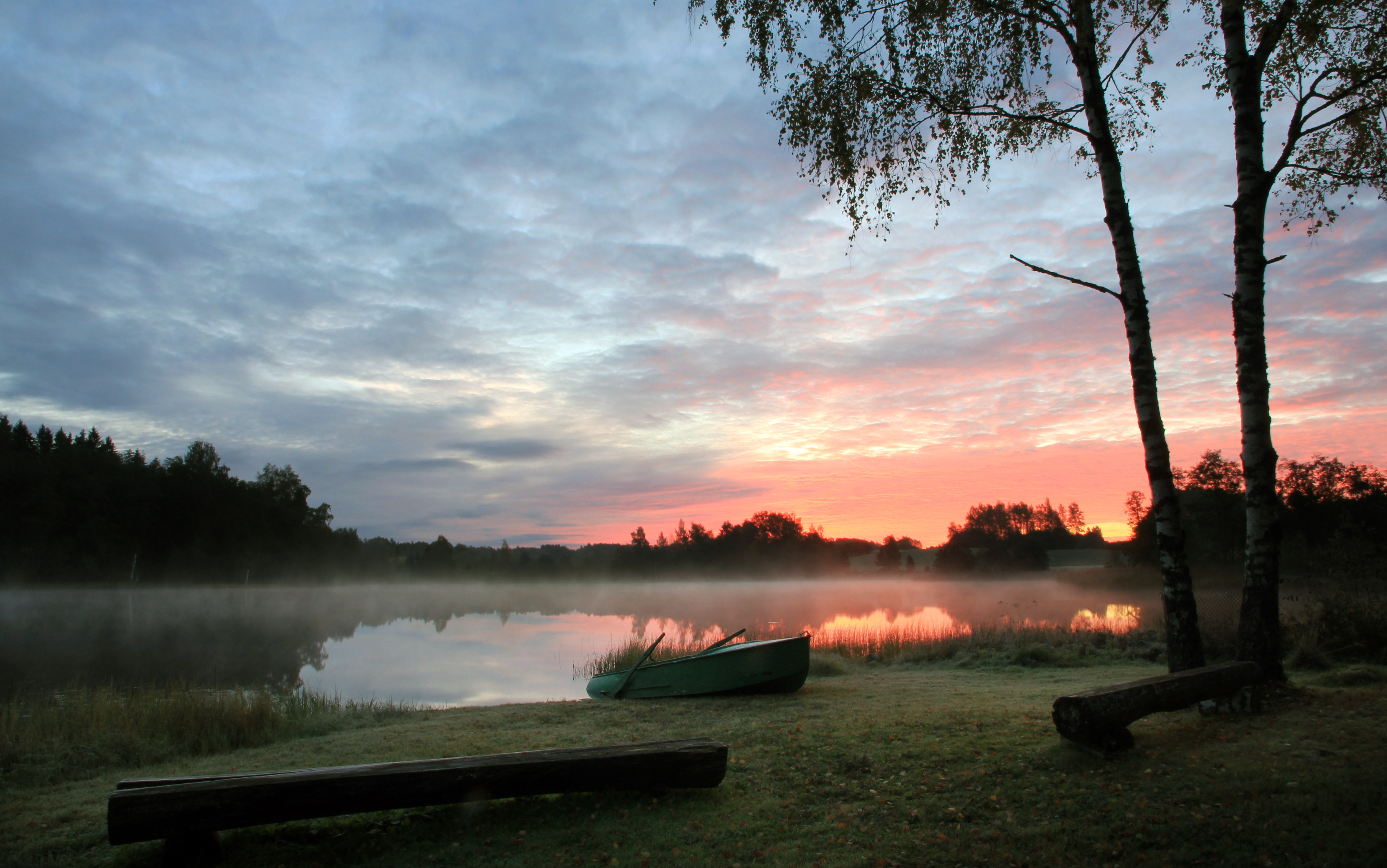 Supluskoht Haanjamaa